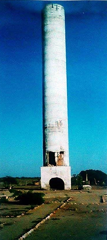 Tubo del Ingenio